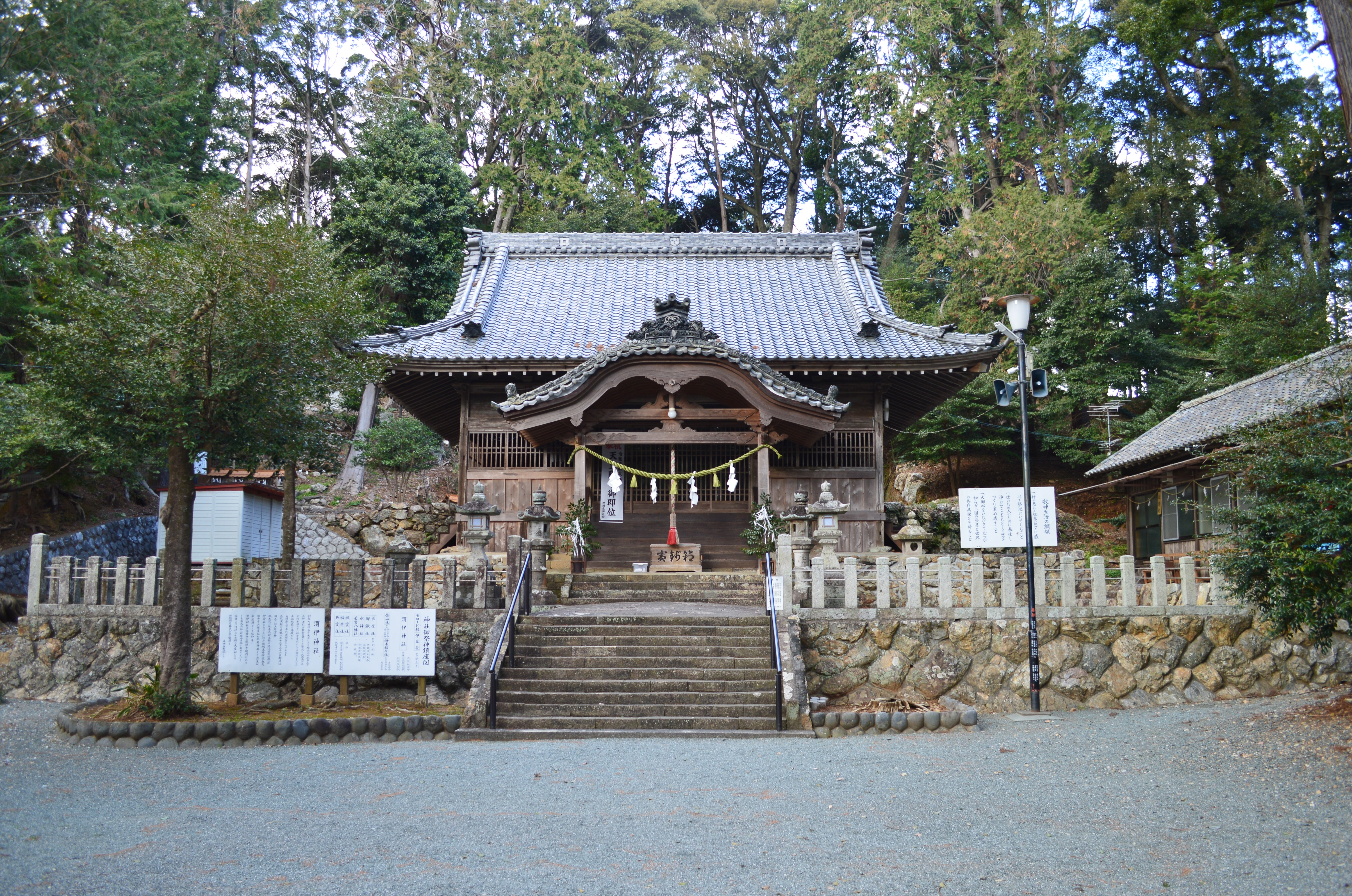 渭伊神社 拝殿